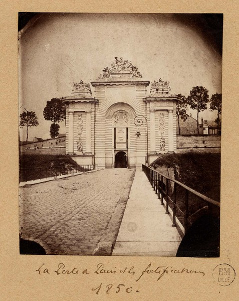 Lille (France - Dép. du Nord) : La Porte de Paris et les fortifications (côté campagne). L'actuel Boulevard Denis Papin n'est pas tout à fait dans l'axe de la Porte de Paris, alors que sur la photo, le pont-levis, la passerelle - ou Pont dormant - surplombant le fossé semble l'être. Date : 1850 Dimensions : 8,5 x 10,3 cm.